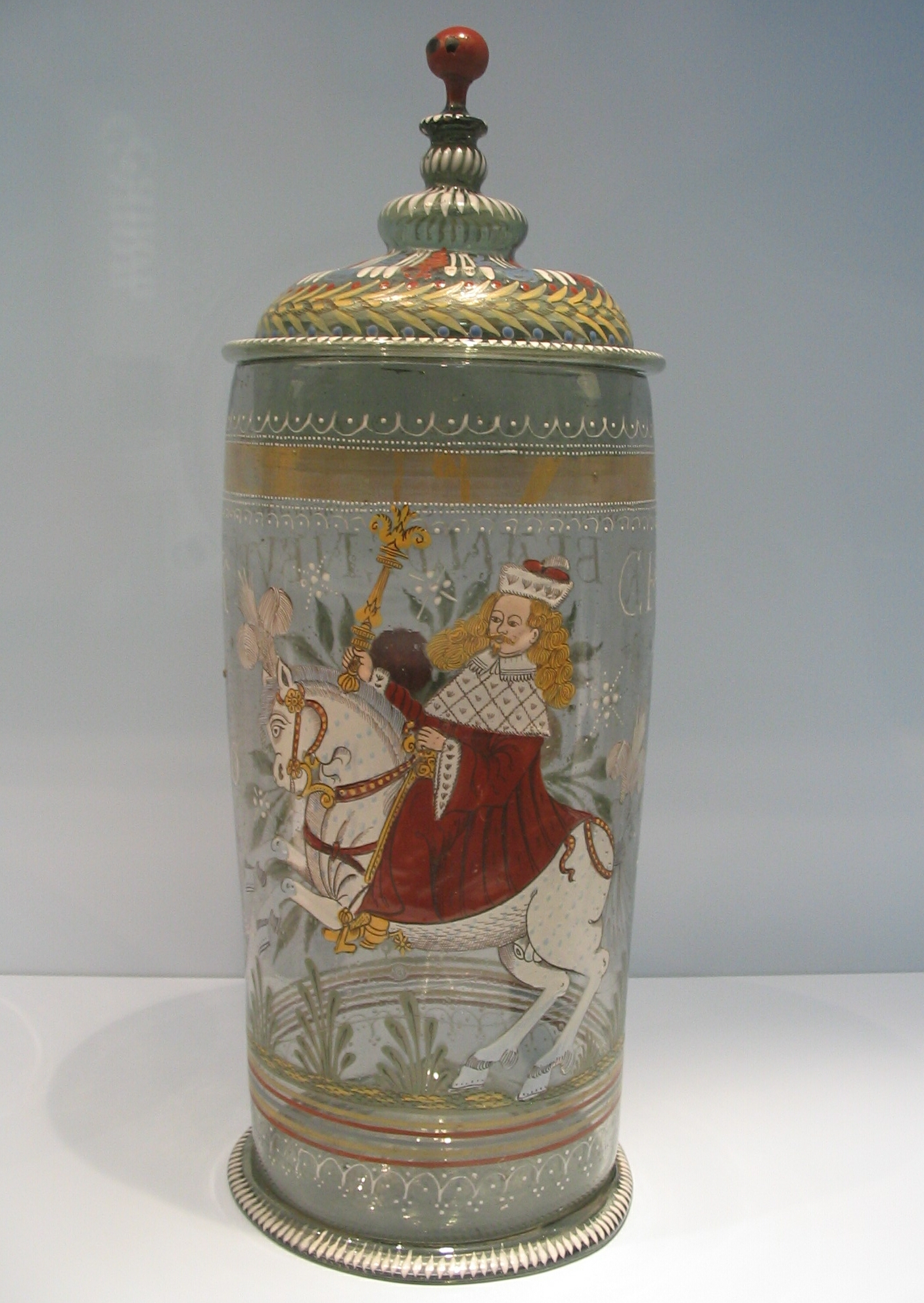 Humpen, 1455 Museum Kunst Palast, Glassammlung Hentrich, Düsseldorf